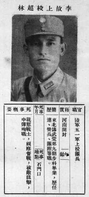 中文（台灣）: 抗戰軍人忠烈錄第一輯中的烈士遺像